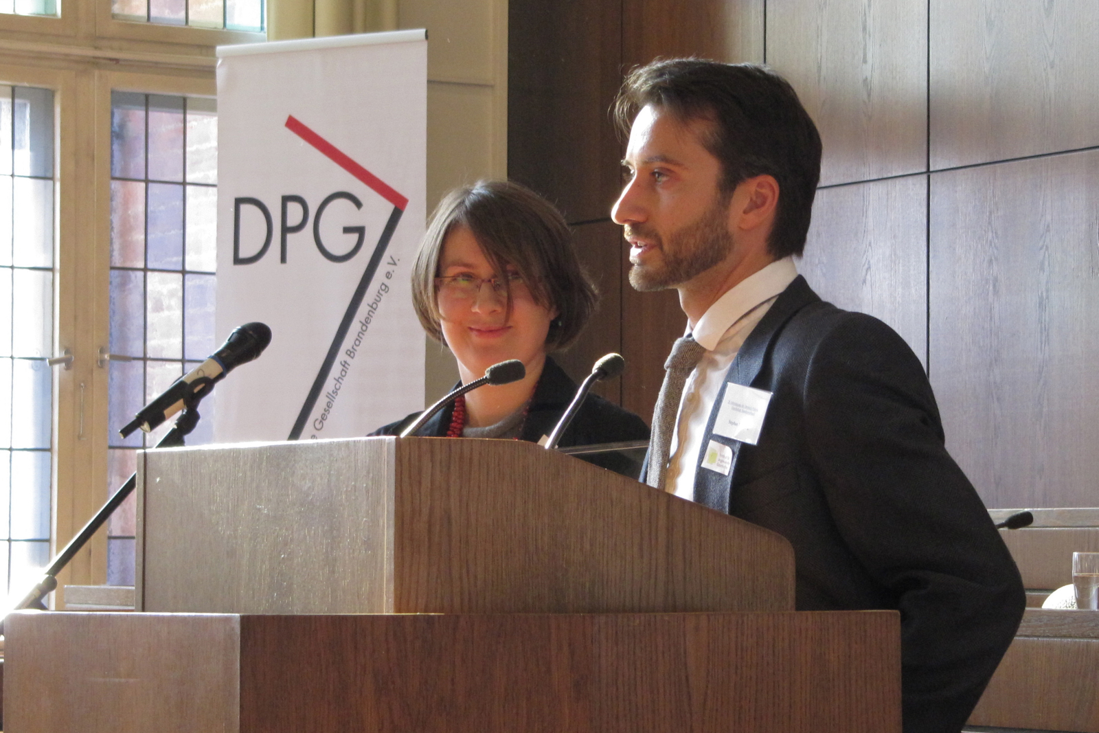 Verleihung des DIALOG-Preises an das Institut für angewandte Geschichte, Frankfurt 2011. Im Bild die Preisträger Magdalena Abraham-Diefenbach und Stephan Felsberg.